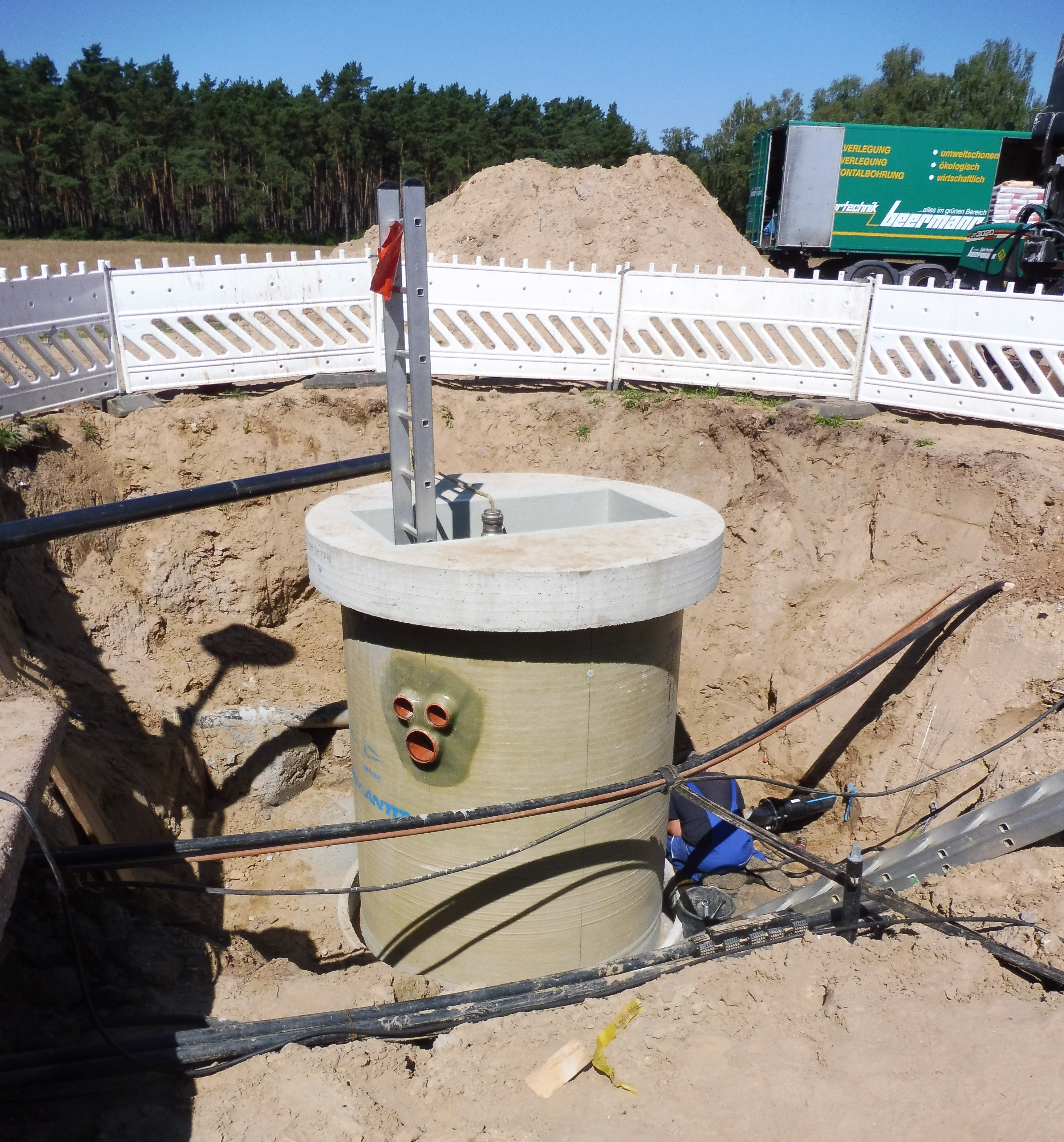 Ersatz eines Abwasserpumpschachts